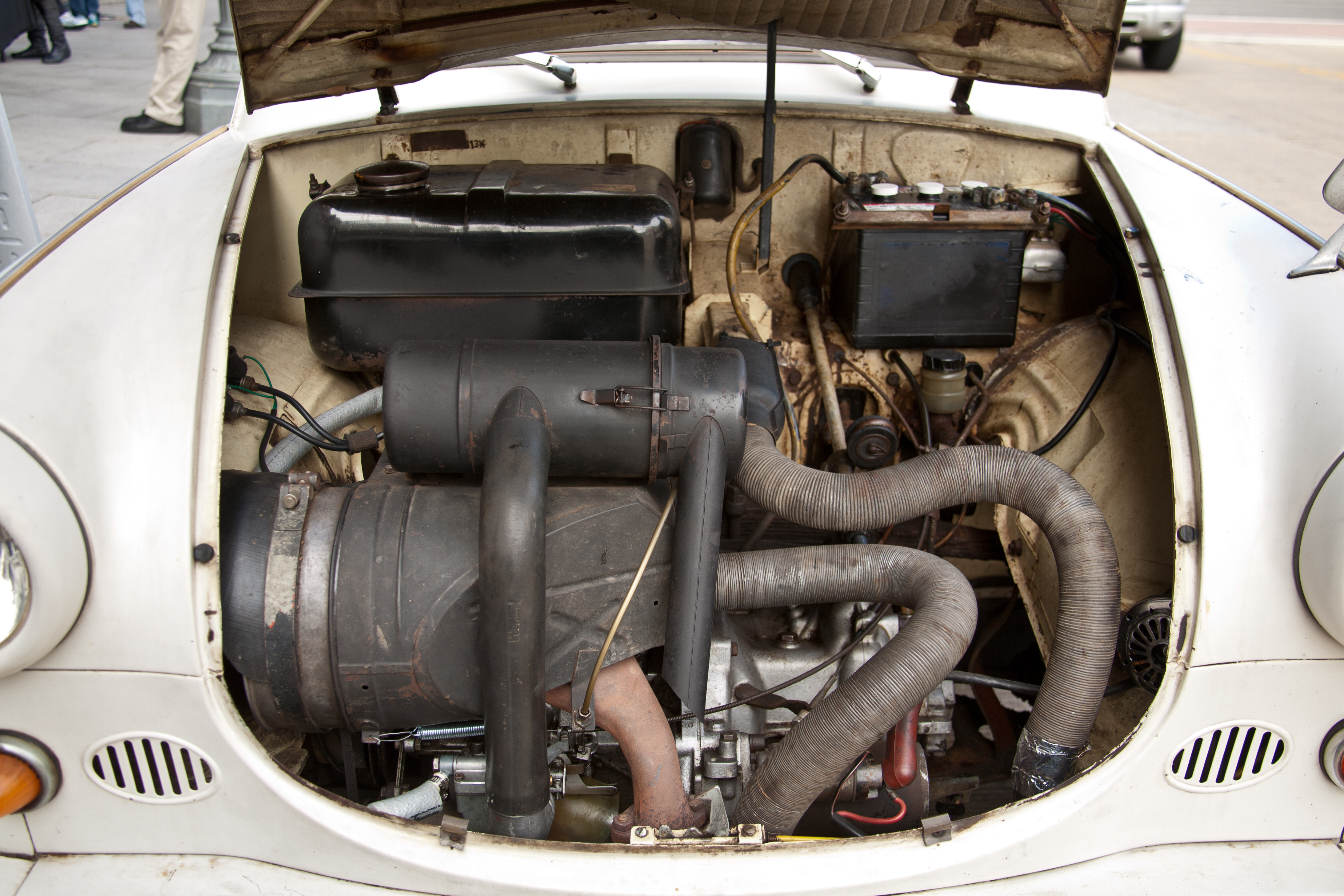 1963 P600 Sedan